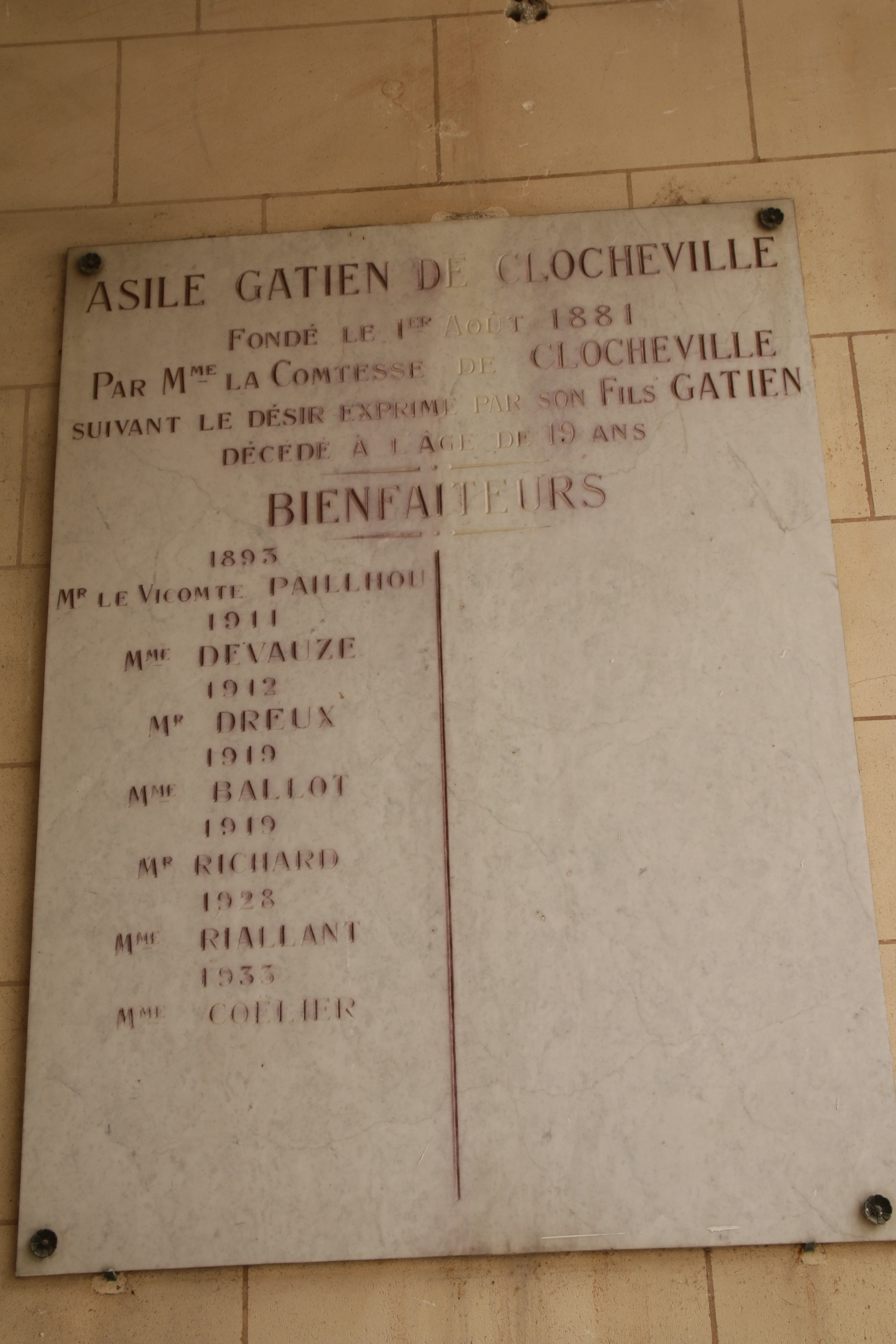 Plaque remerciant les personnes ayant aidés à construire l'asile Gatien de Clocheville.